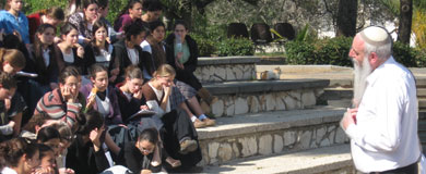 הרב יורם צהר, ראש האולפנת כפר פינס, מעביר שיחה לבנות האולפנא.